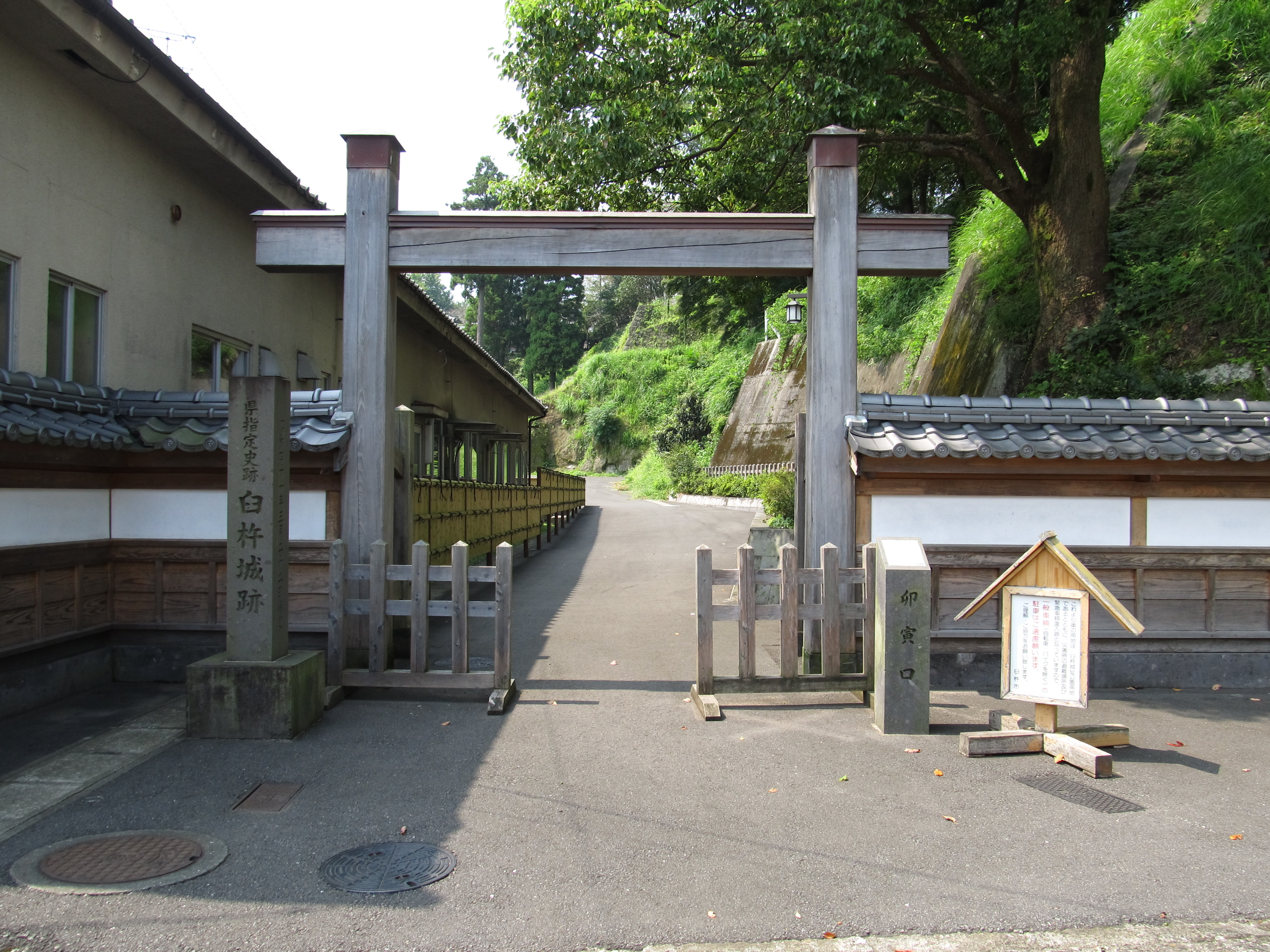 大分県臼杵市にある臼杵城跡（臼杵公園）の卯寅口（うとのぐち）。